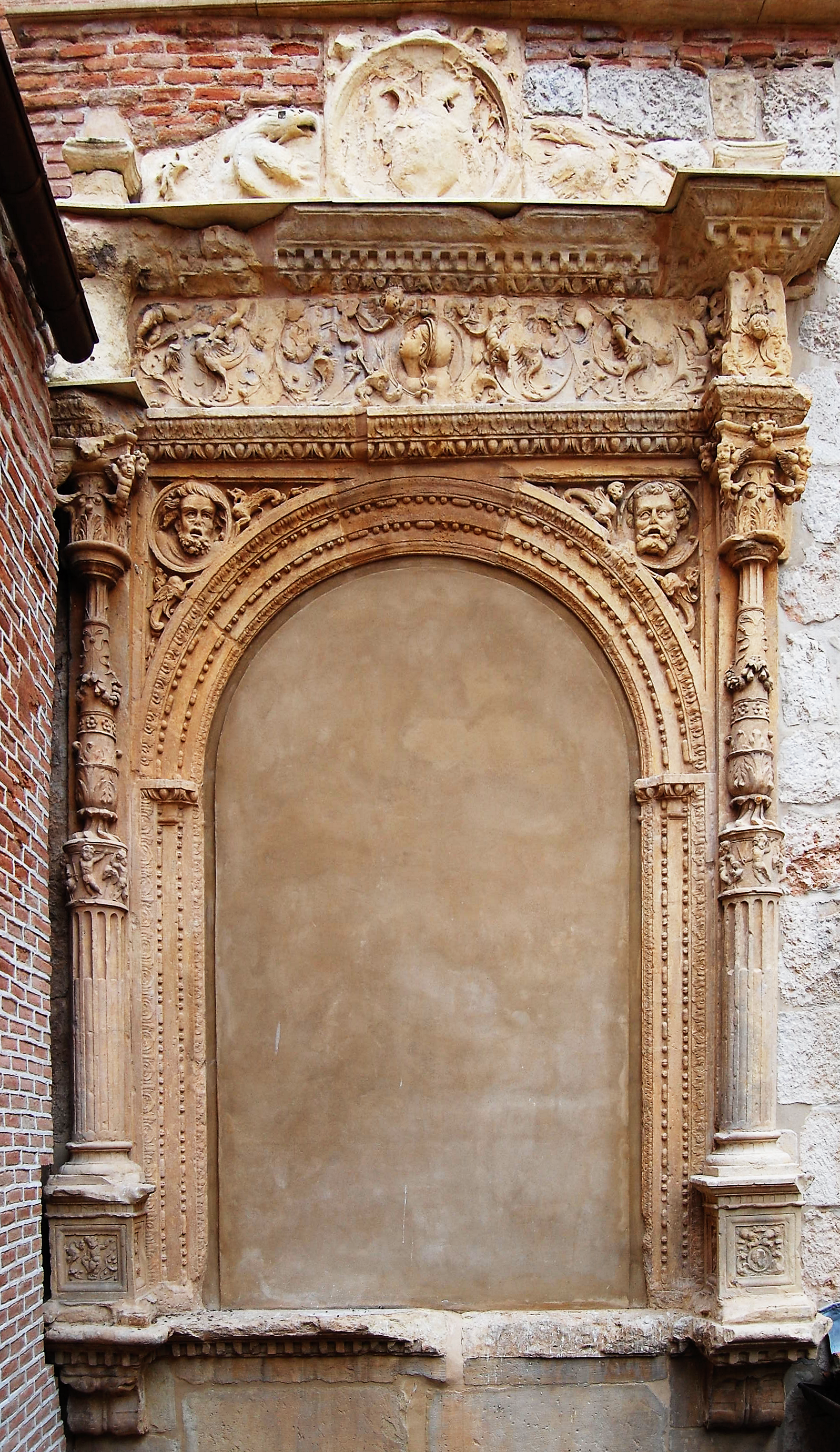 Portada del Torreón del Archivo General Central del Reino (actual Palacio Arzobispal) de Alcalá de Henares (Comunidad de Madrid - España). Pórtico de estilo plateresco.